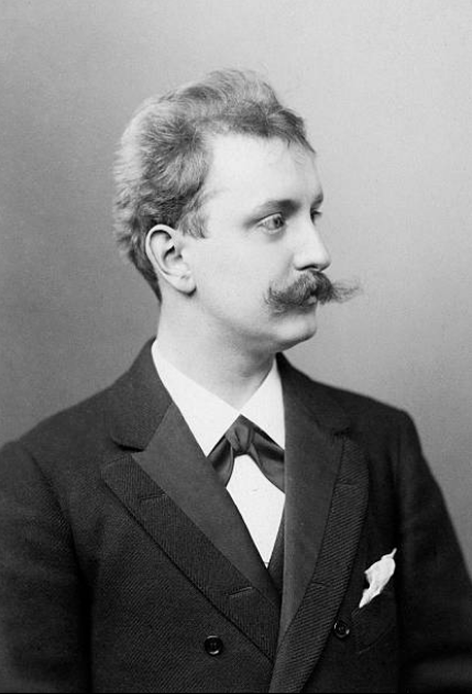 Photographie des Bildhauers Reinhold Felderhoff von Wilhelm Fechner, 1900